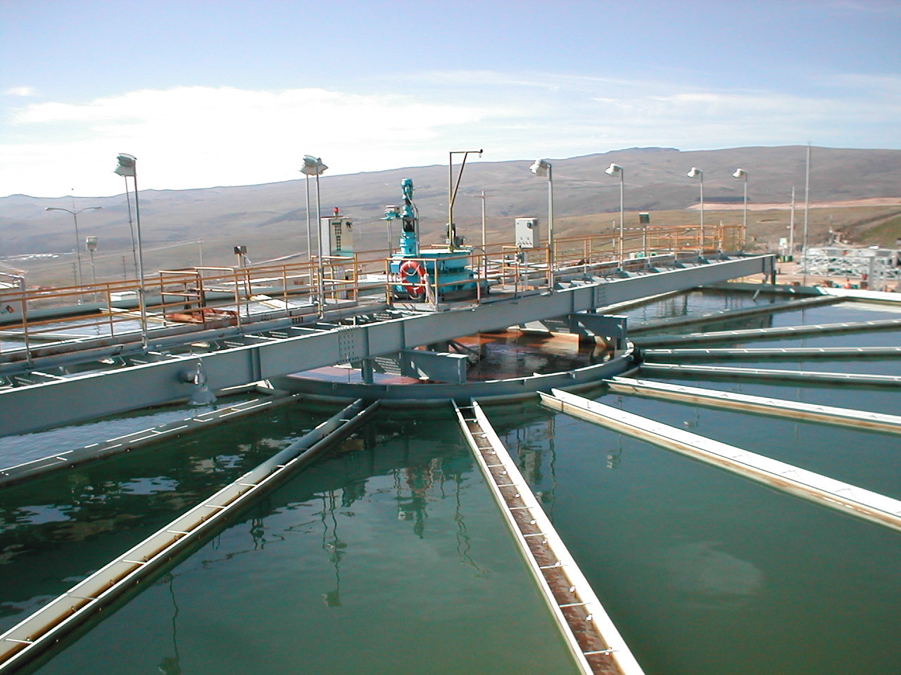 Planta de Tratamiento de Aguas Acidas